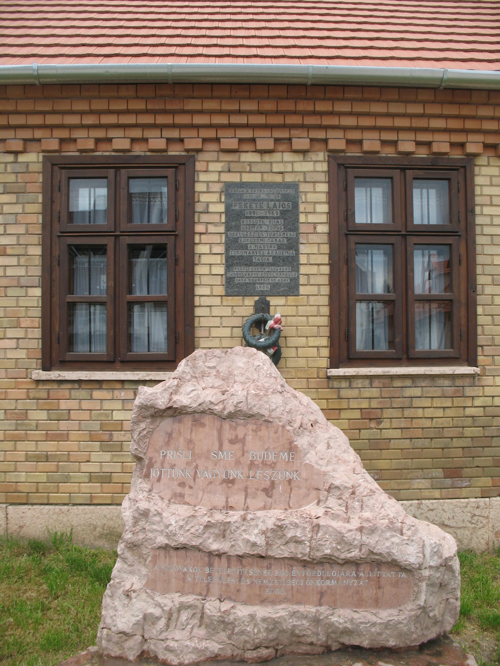 Tardos